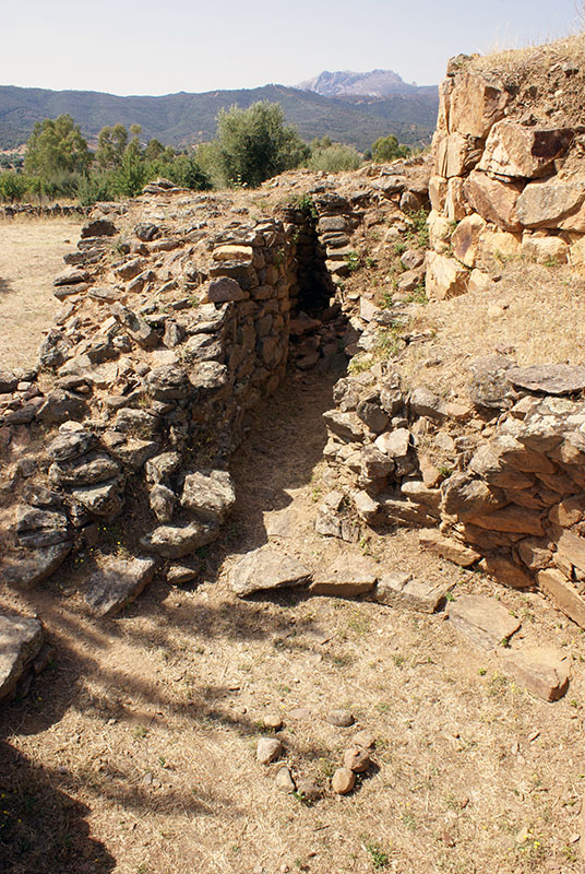 Nuraghe San Pietro